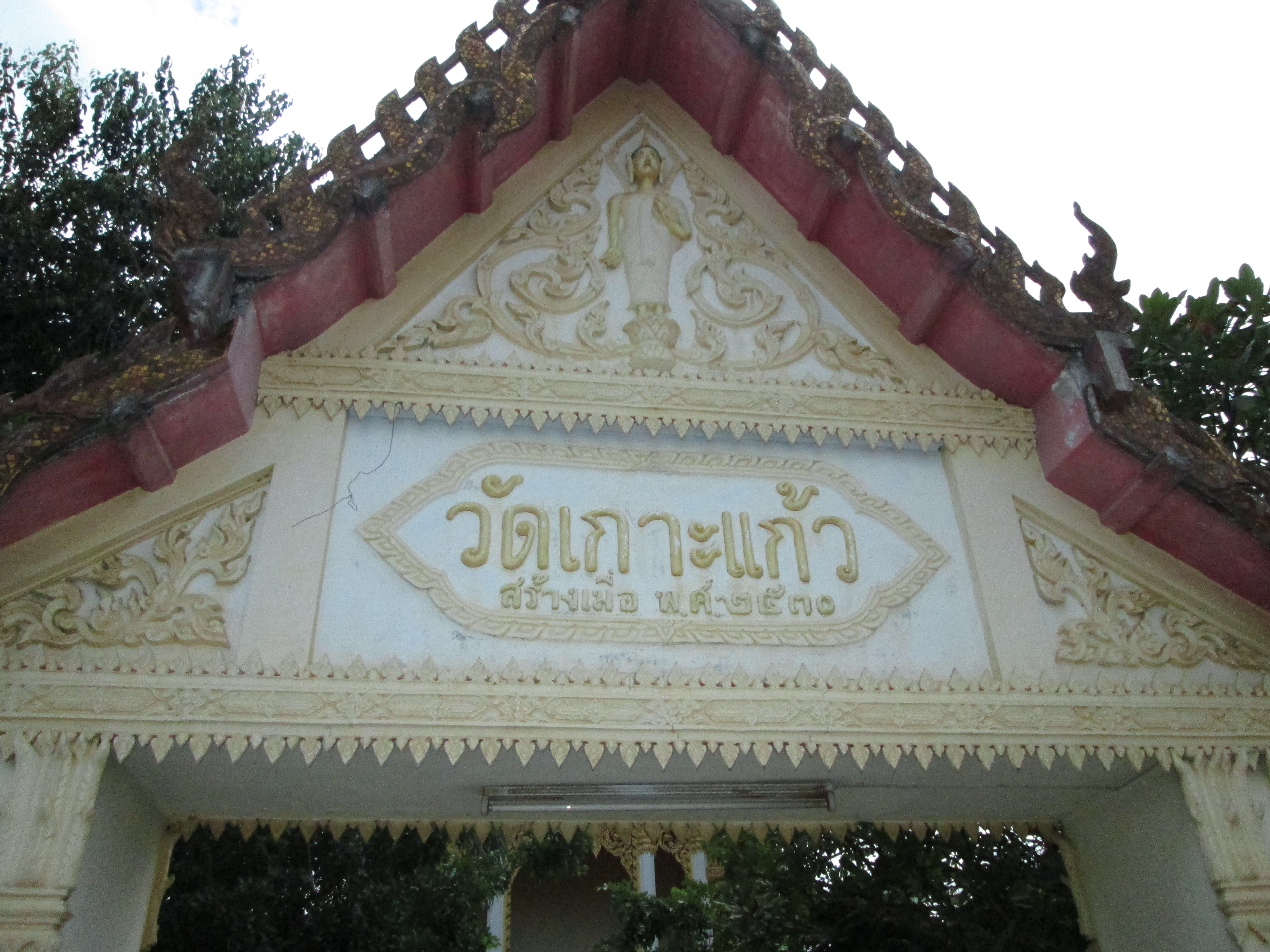 ซุ้มประตูวัดเกาะแก้ว